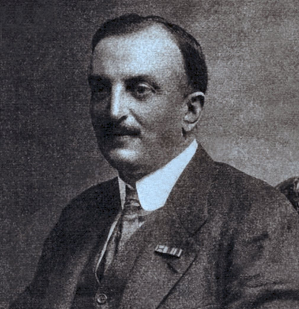 Stephan Graf Wassilko von Serecki 1918